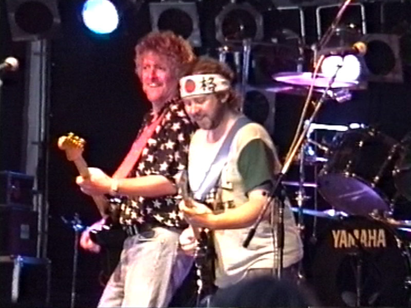 Wolle Kriwanek (links) und Paul Vincent (rechts) beim Auftritt der Wolle Kriwanek Band beim Kraichgau Open Air im Waldstadion Eppingen am 29. August 1992. Weitere Bands damals dort: Razorblades, Fred is Dad und Dorfcombo. Videostill aus einer von mir damals gefilmten Festivaldoku.